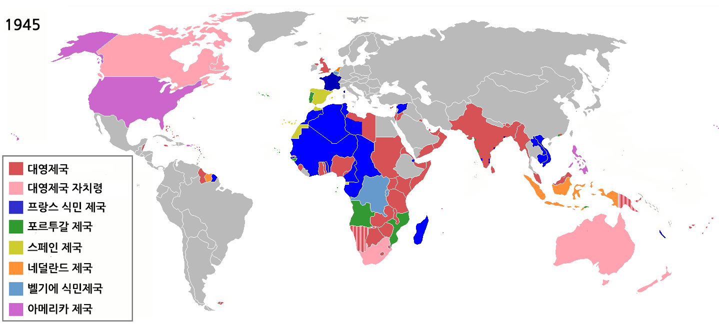 1945년 다양한 국가의 식민지들 및 당시 식민지의 경계 (한글)